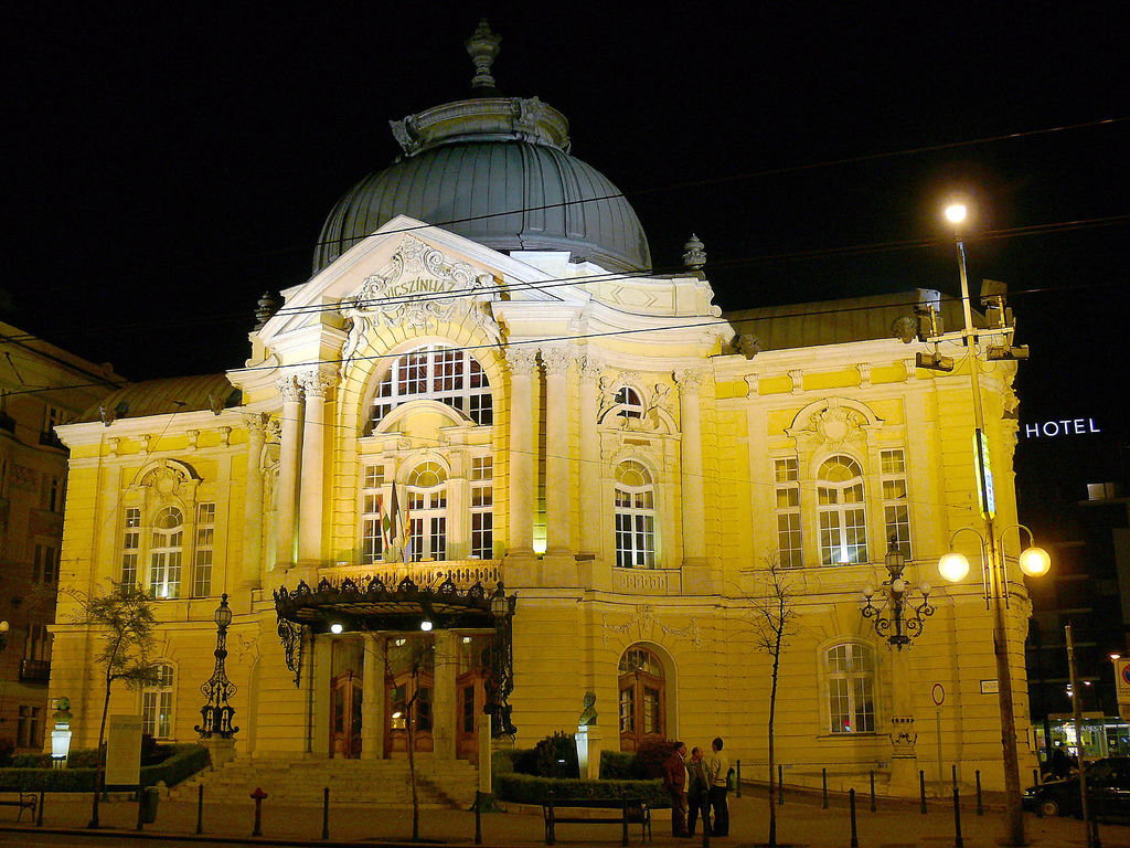 A budapesti Vígszínház éjszakai megvilágításban / The Vígszínház in Budapest by night